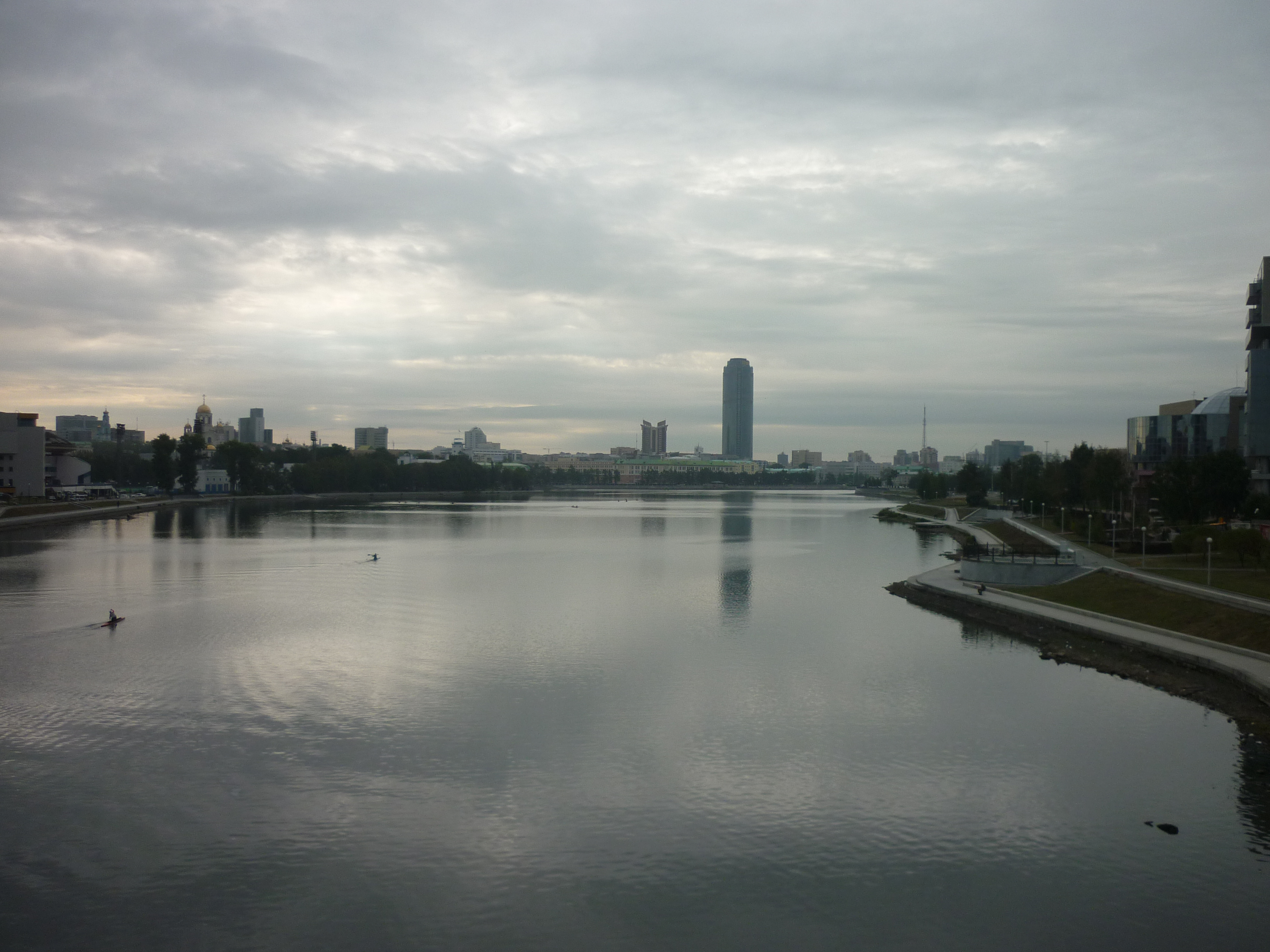 Мост на улице Челюскинцев